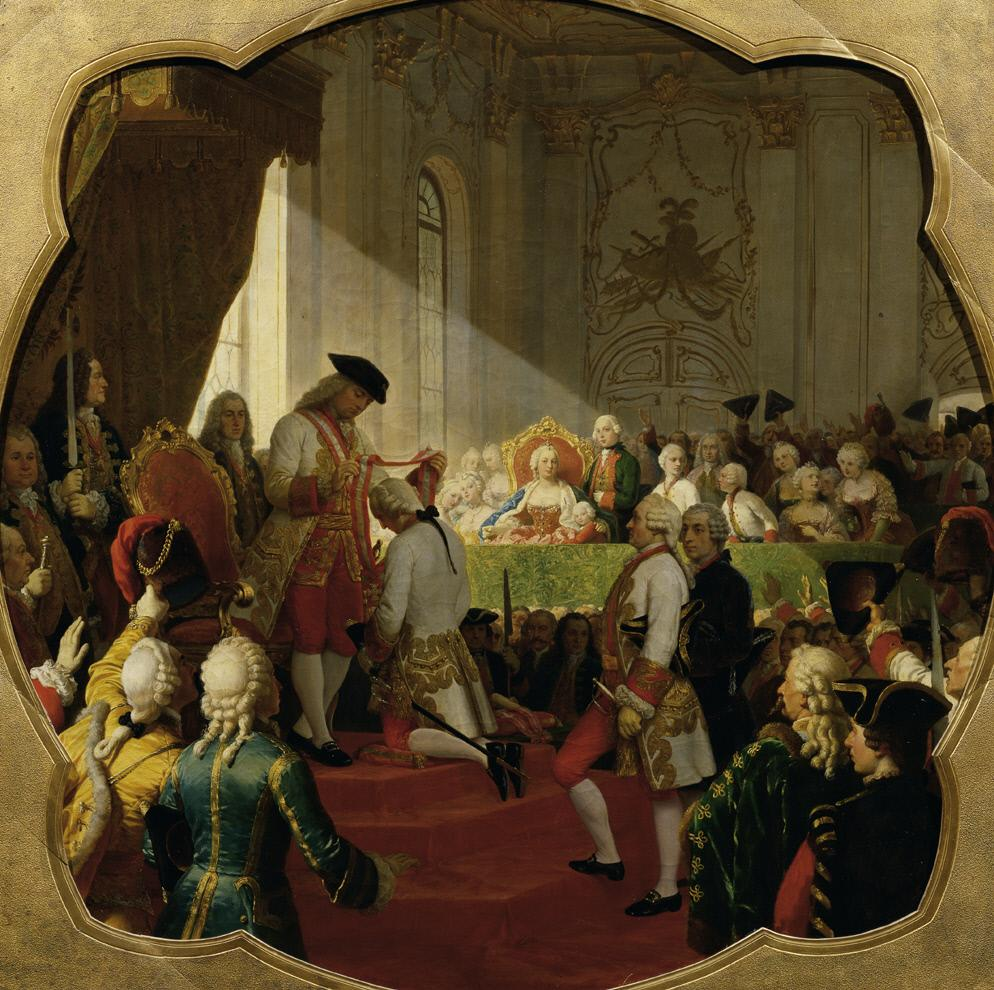 A Katonai Mária Terézia-rend első promóciója, 1758